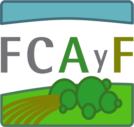 Logo FCAyF - UNLP